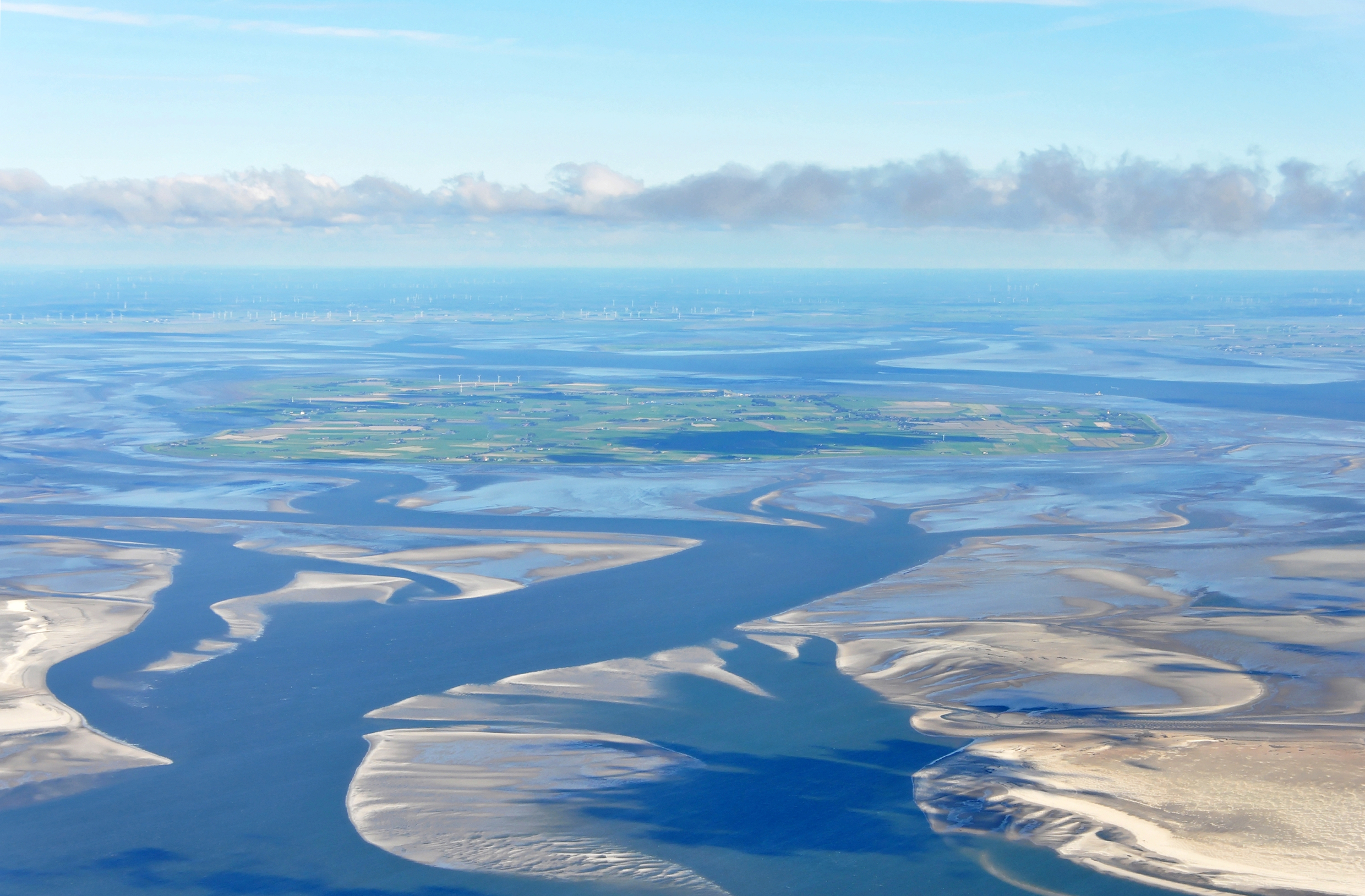 Luftaufnahmen Nordseekueste 2013-09